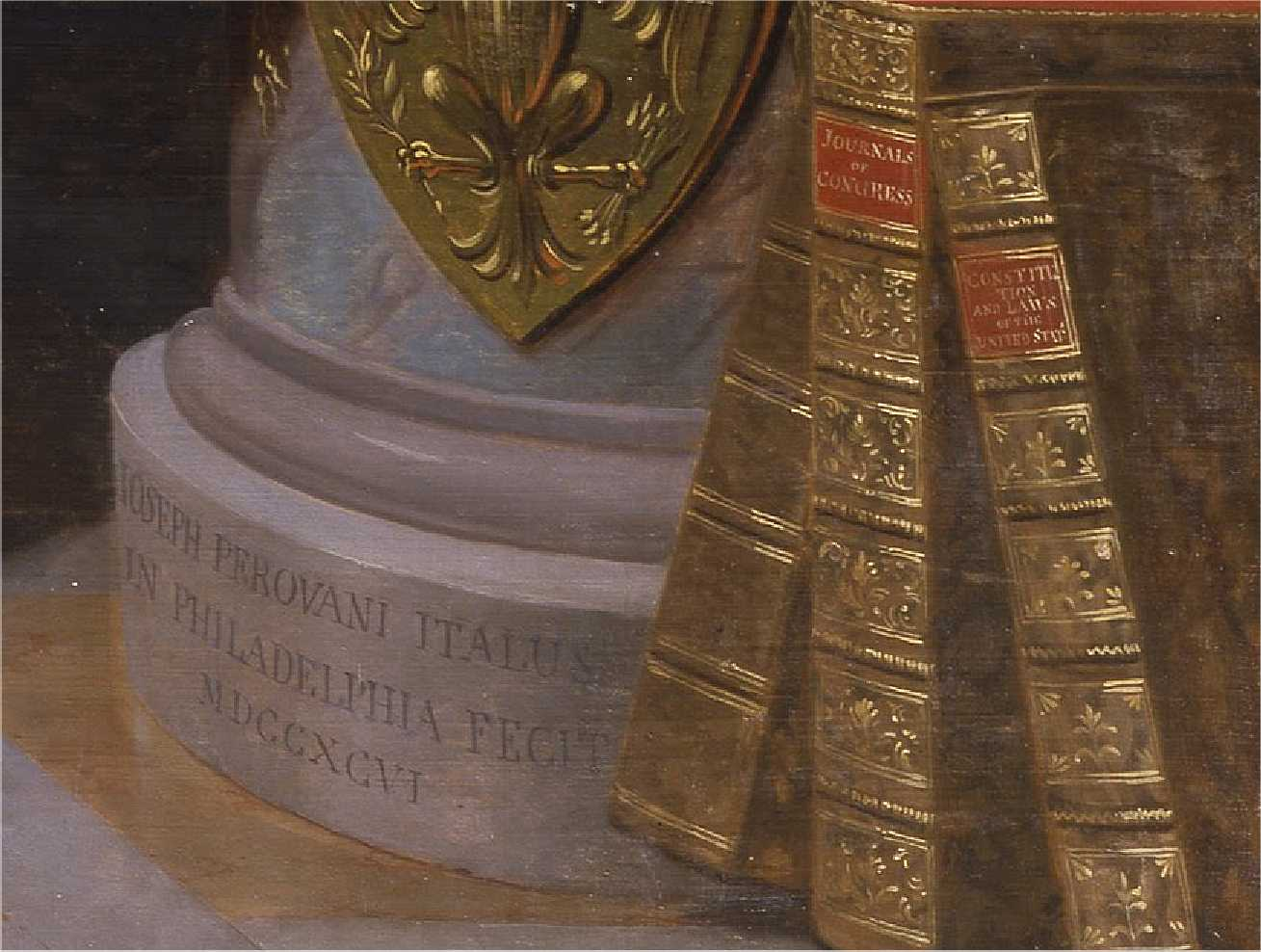 Dettaglio del ritratto in piedi di George Washington dipinto da Giuseppe Perovani (Brescia, Italia, 1765 - Messico 1835) a Filadelfia nel 1796, come da lui stesso affermato nella base del gruppo marmoreo raffigurante due divinità mitologiche (Minerva e Giunone) a cui si appoggiano tre libri di cui due sono: "Journals of Congress" e "Constitution and Laws of the United States". Il dipinto è custodito presso l'Accademia di San Fernando a Madrid, Spagna.